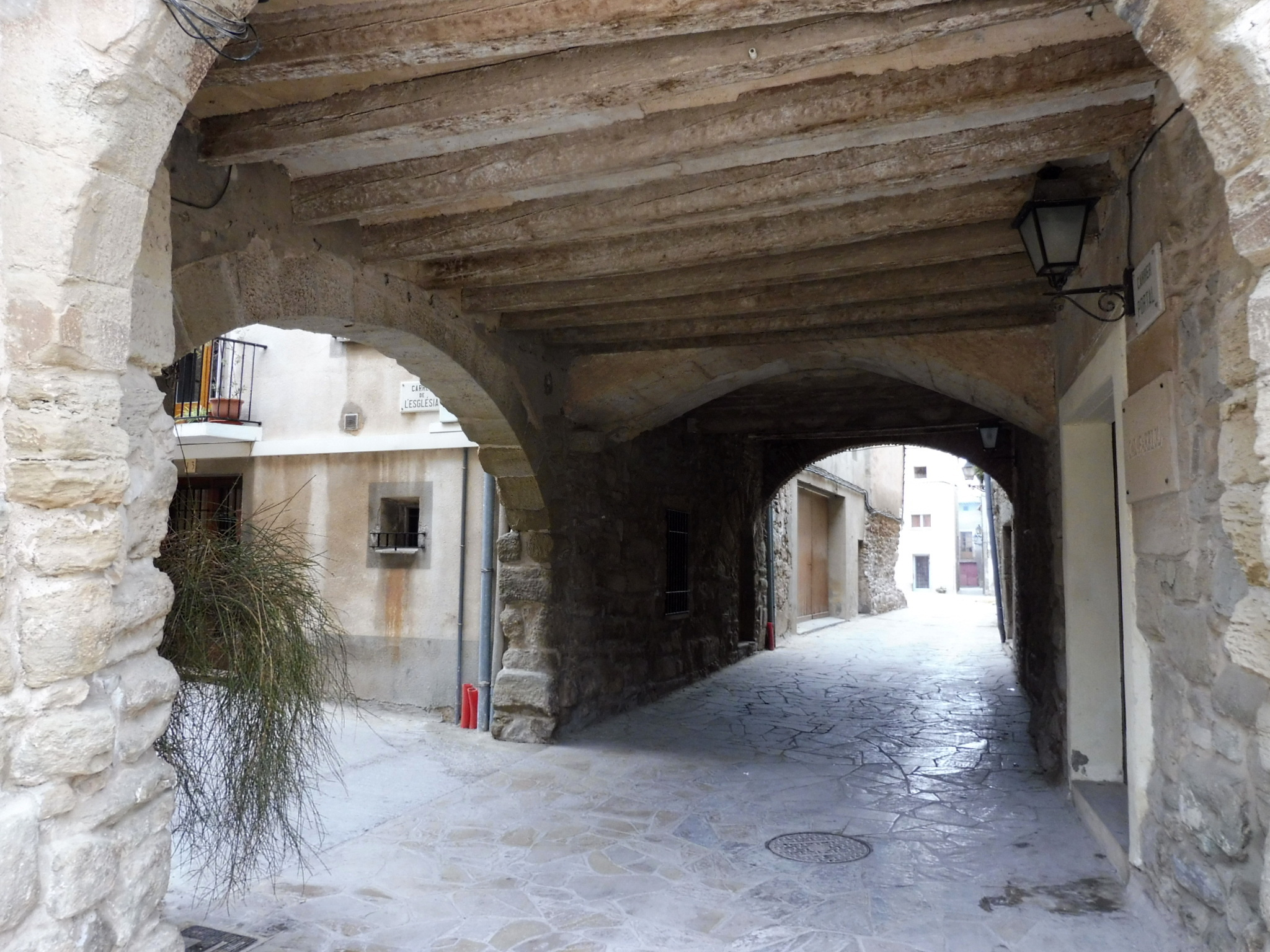 Murs i portals de l'antiga Vila Closa (la Fuliola): interior del portal